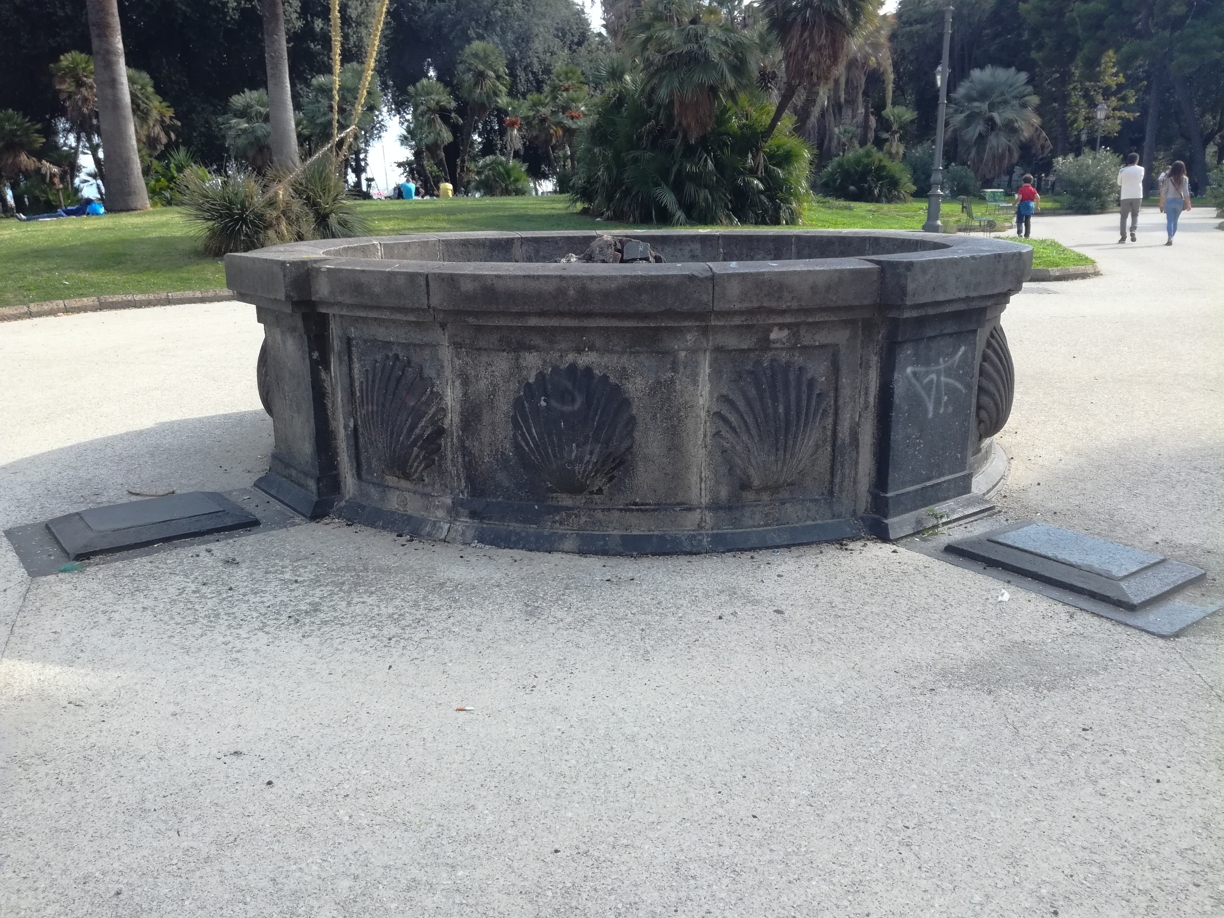 Fontana della Conchiglia (Napoli)